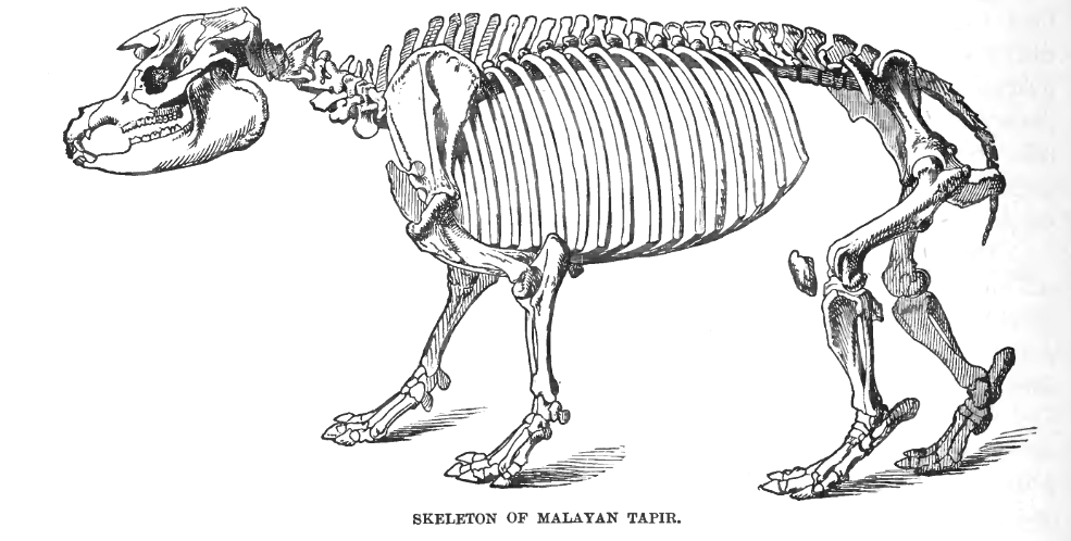 Tapir skeleton